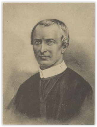 Joannes Baptista Romme CssR (Breda, 1832- Coronie, 1882). R.K. priester-missionaris te Suriname (Paramaribo, Batavia, Coronie).